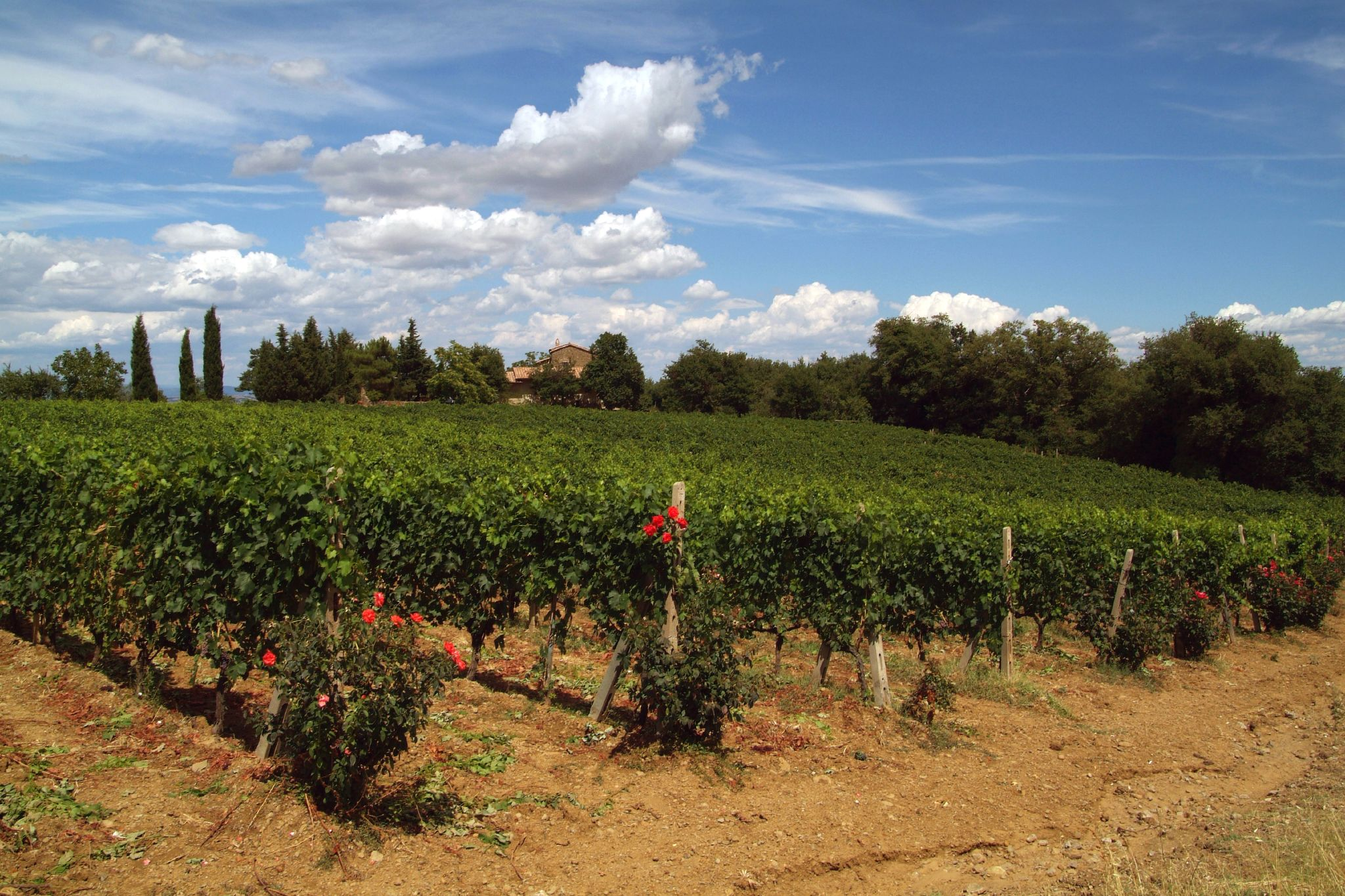 Sangiovese vines of Brunello di Montalcino in Tuscany